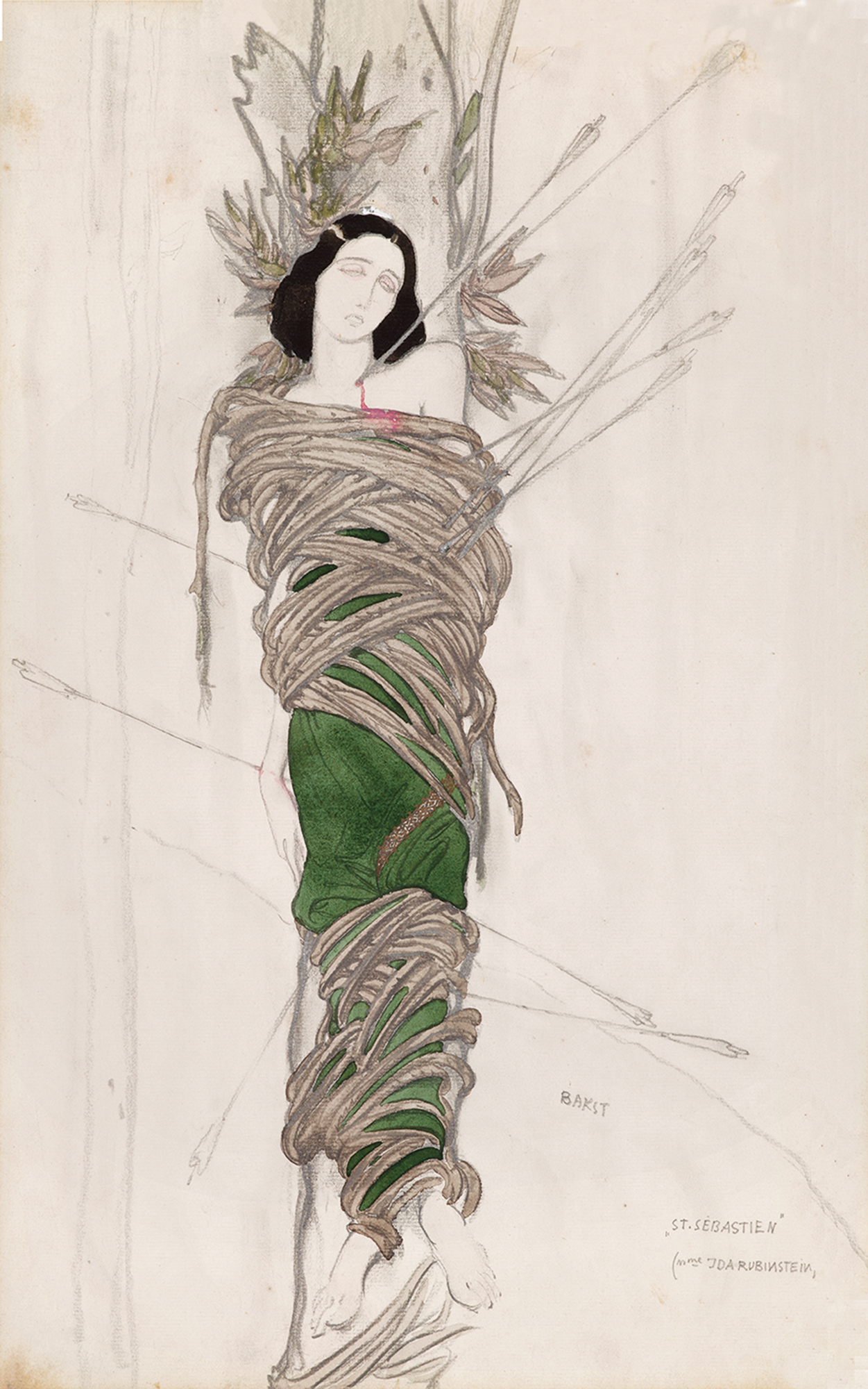 Léon Bakst, Costume for dancer Ida Rubinstein (1885-1960) in the leading male role in Gabriele D'Annunzio's Le marthyre de Saint Sébastien, 1912. Святой Себастьян. Эскиз костюма к мистерии Габриеле д-Аннунцио *Мученичество святого Себастьяна*. 1911 Бумага верже, карандаш, акварель 44.5 × 27.5 cм